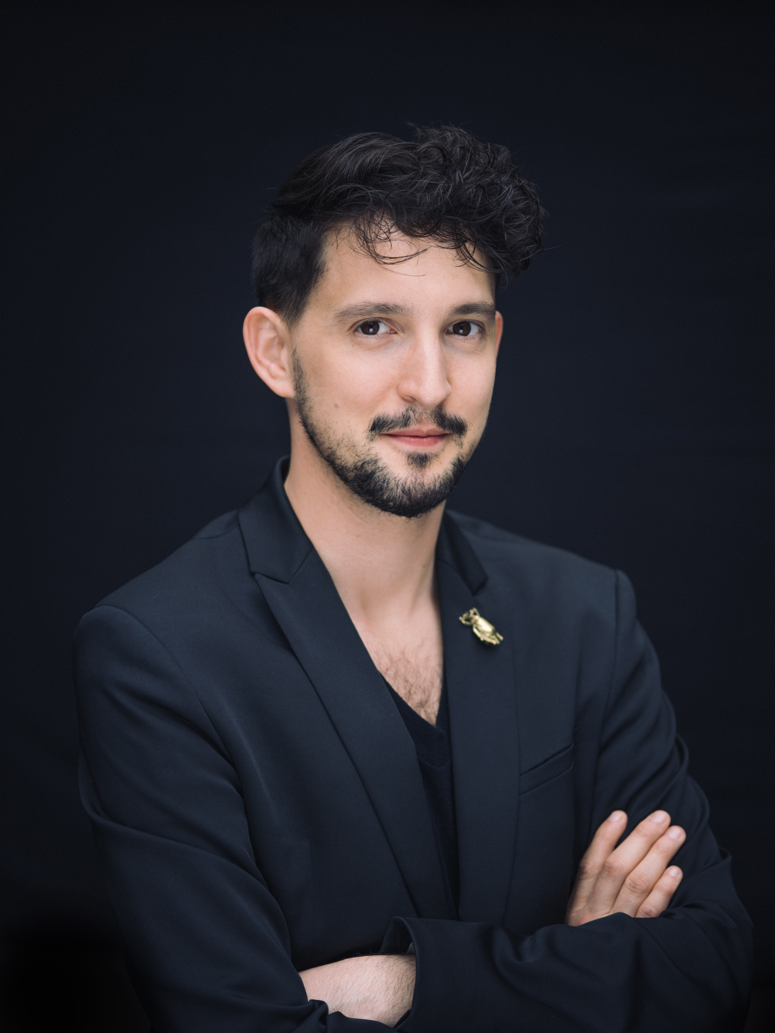 Nikolaus Habjan © Lupi Spuma